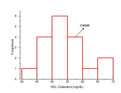 figura de um histograma para uso no verbete histograma